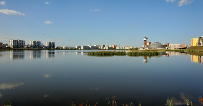 Озеро Сайсары: Якутск, Якутия (Саха) This image is related to the protected area of Russia number 1420259